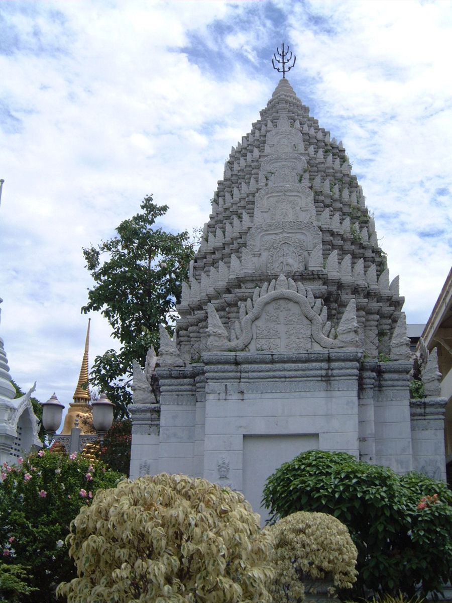 Wat Ratchabopit (วัดราชบพิธสถิตมหาสีมารามราชวรวิหาร): royal cemetry, Bangkok, Thailand